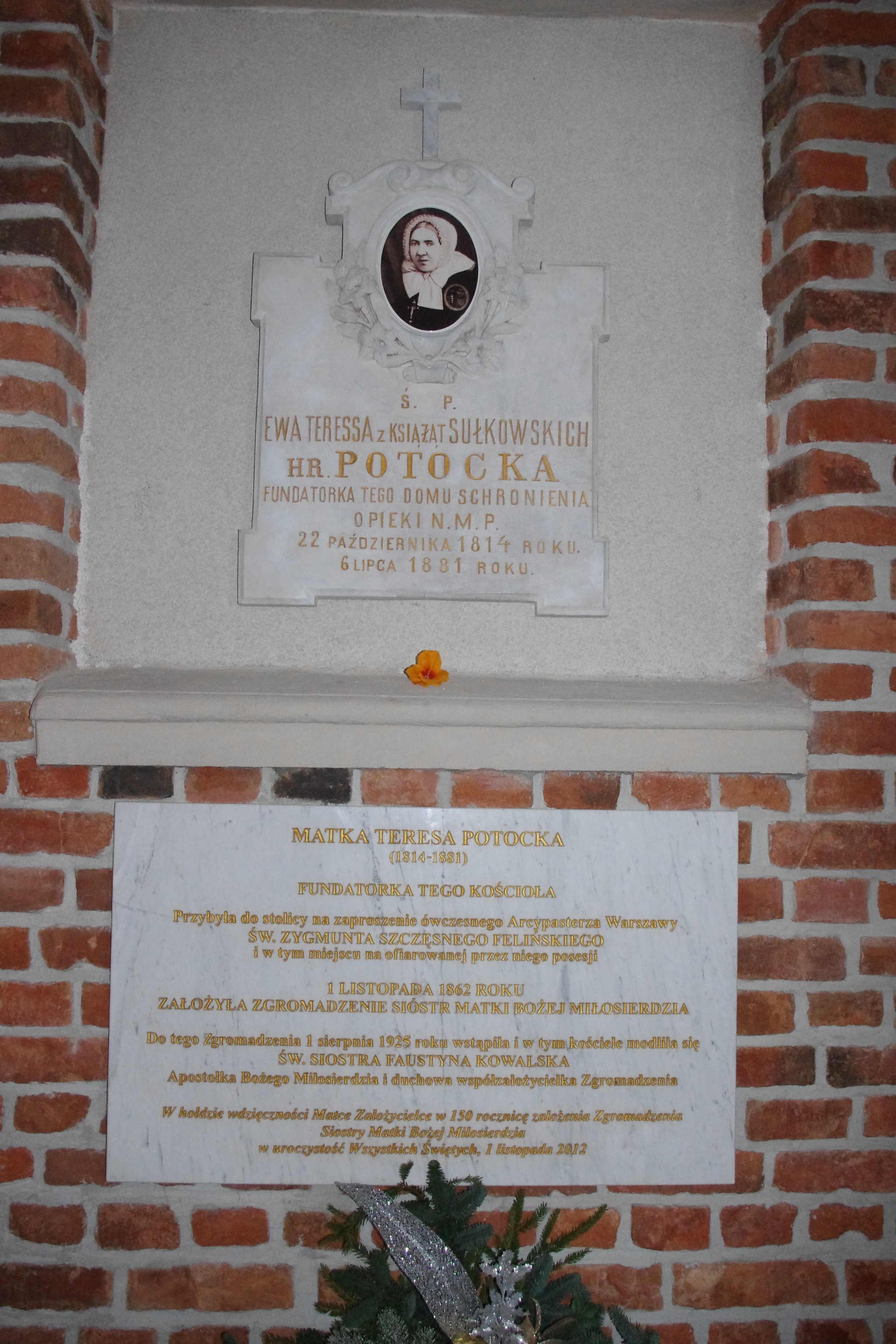 Tablica pamiątkowa upamiętniająca hrabinę Ewę Karolinę Potocką z domu Sułkowską znaną jako siostra Teresa Potocka lub matka Teresa Potocka – założycielkę Zgromadzenia Sióstr Matki Bożej Miłosierdzia, w Kościele pw. Miłosierdzia Bożego i św. Faustyny w Warszawie.